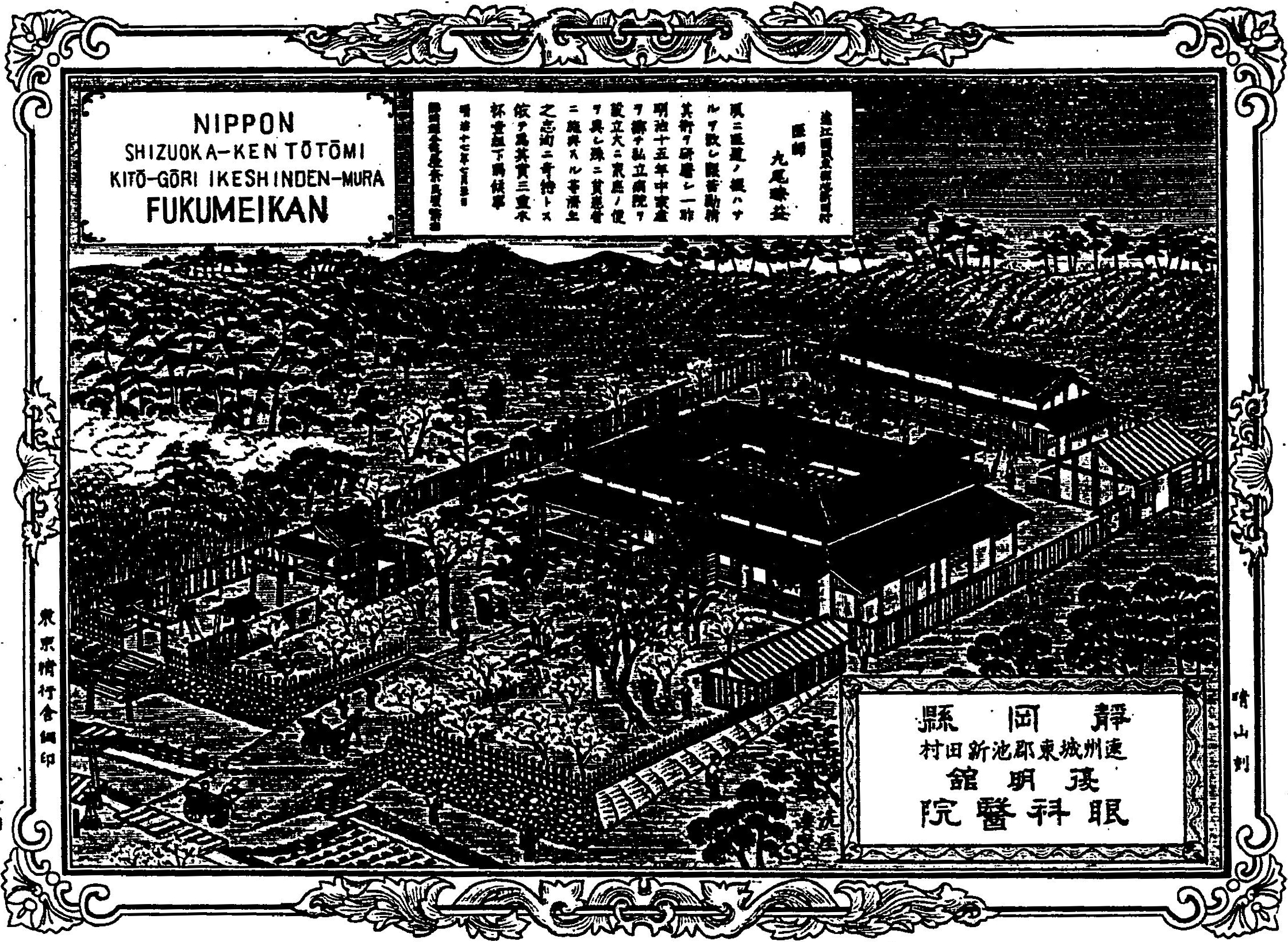 靑山豊太郎編『日本博覧圖――靜岡縣』初篇、精行舎、1892年。